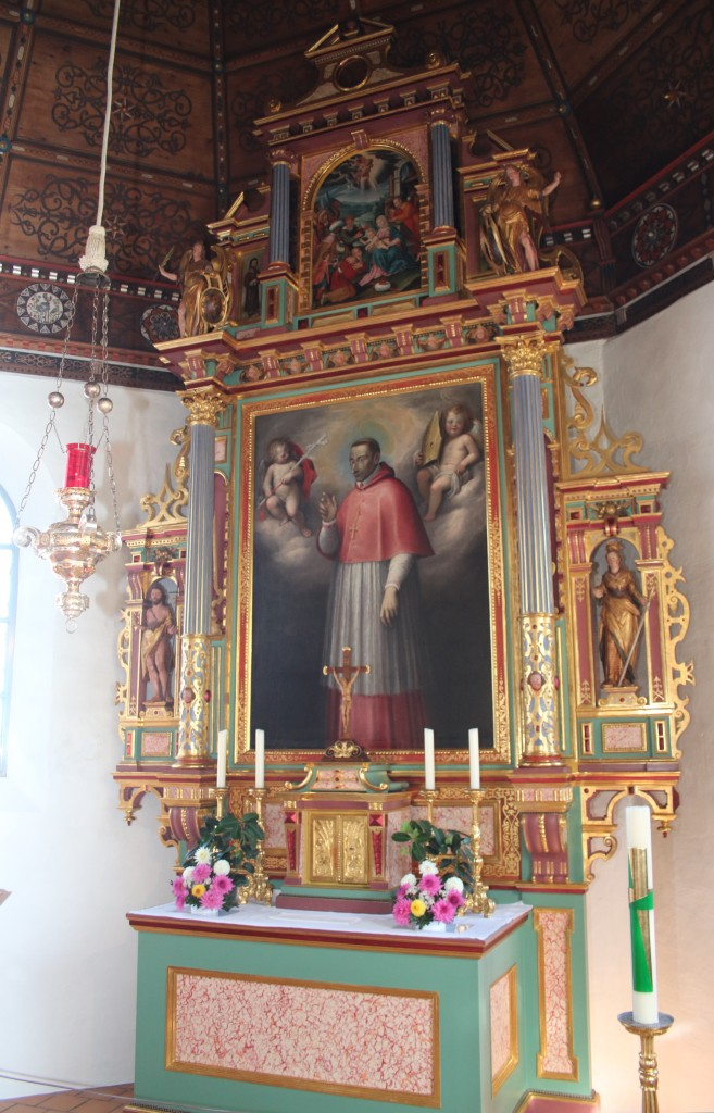 Altar der Flüeli-Kapelle in Flüeli-Ranft.